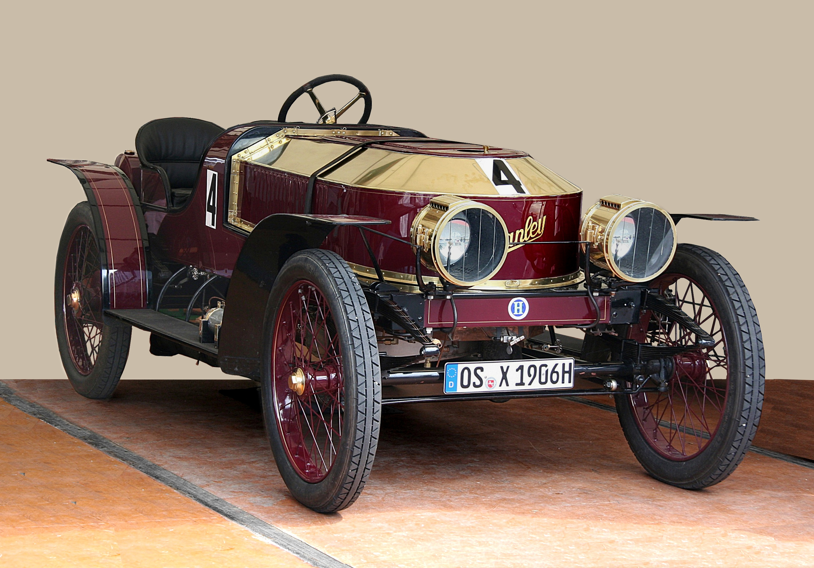 Stanley Steamer Model H "Gentleman's Speedy Runabout", Baujahr 1906, beim AvD-Oldtimer-Grand-Prix 2009 auf dem Nürburgring